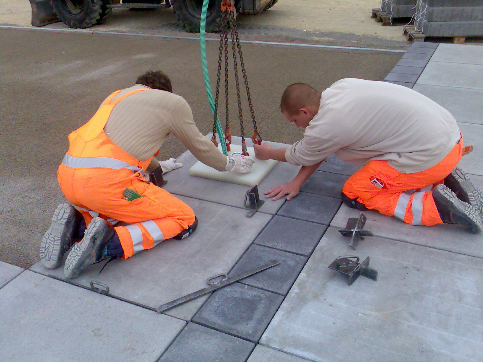 Verlegung von Großformaten vor Kopf (von der Tragschicht aus) mit Vakuumsauggeräten